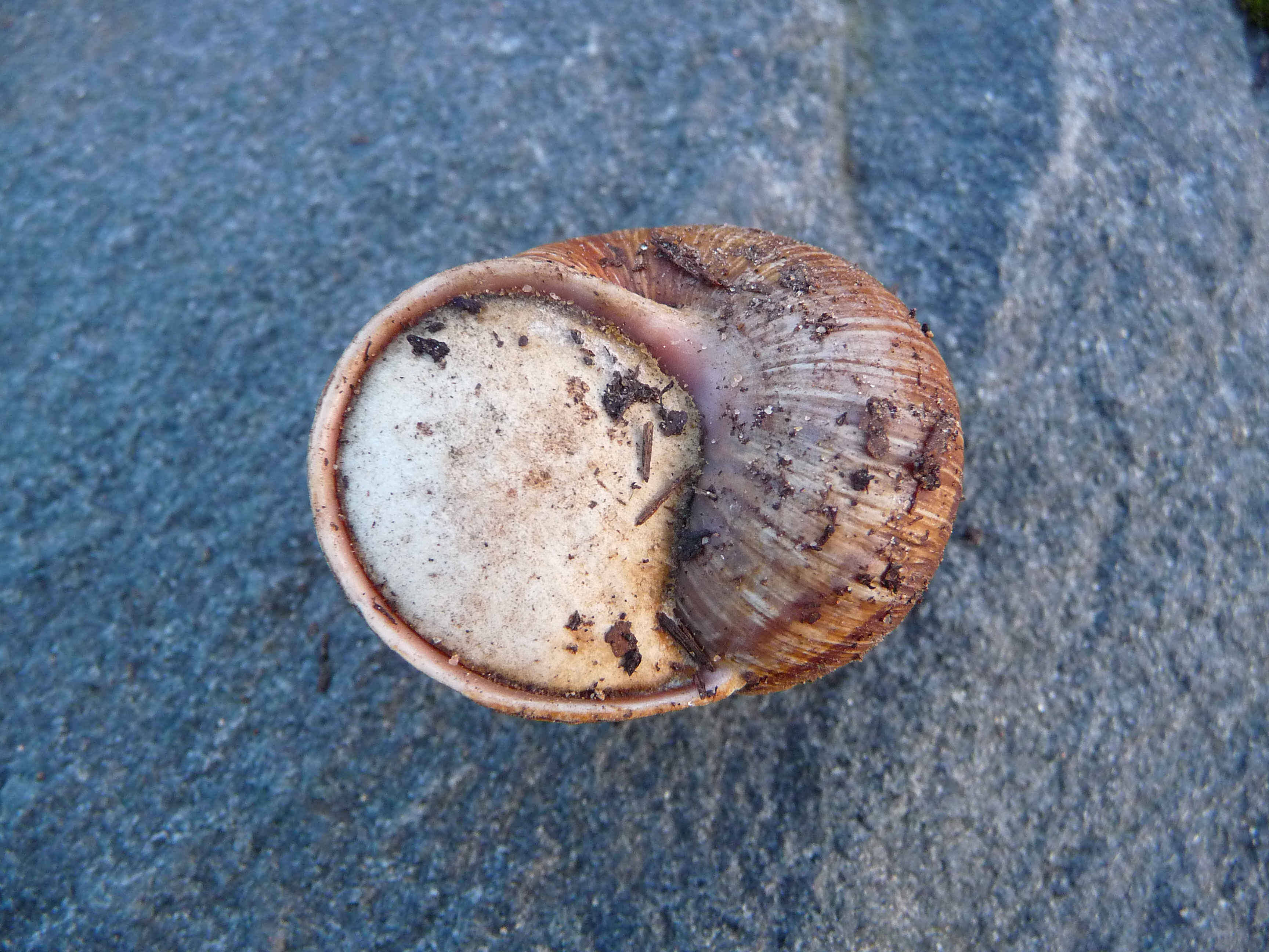 Weinbergschnecke (Helix pomatia) in Winterruhe mit dem schützenden Kalkdeckel (Epiphragma), fotografiert in Heidelberg (Baden-Württemberg, Deutschland)